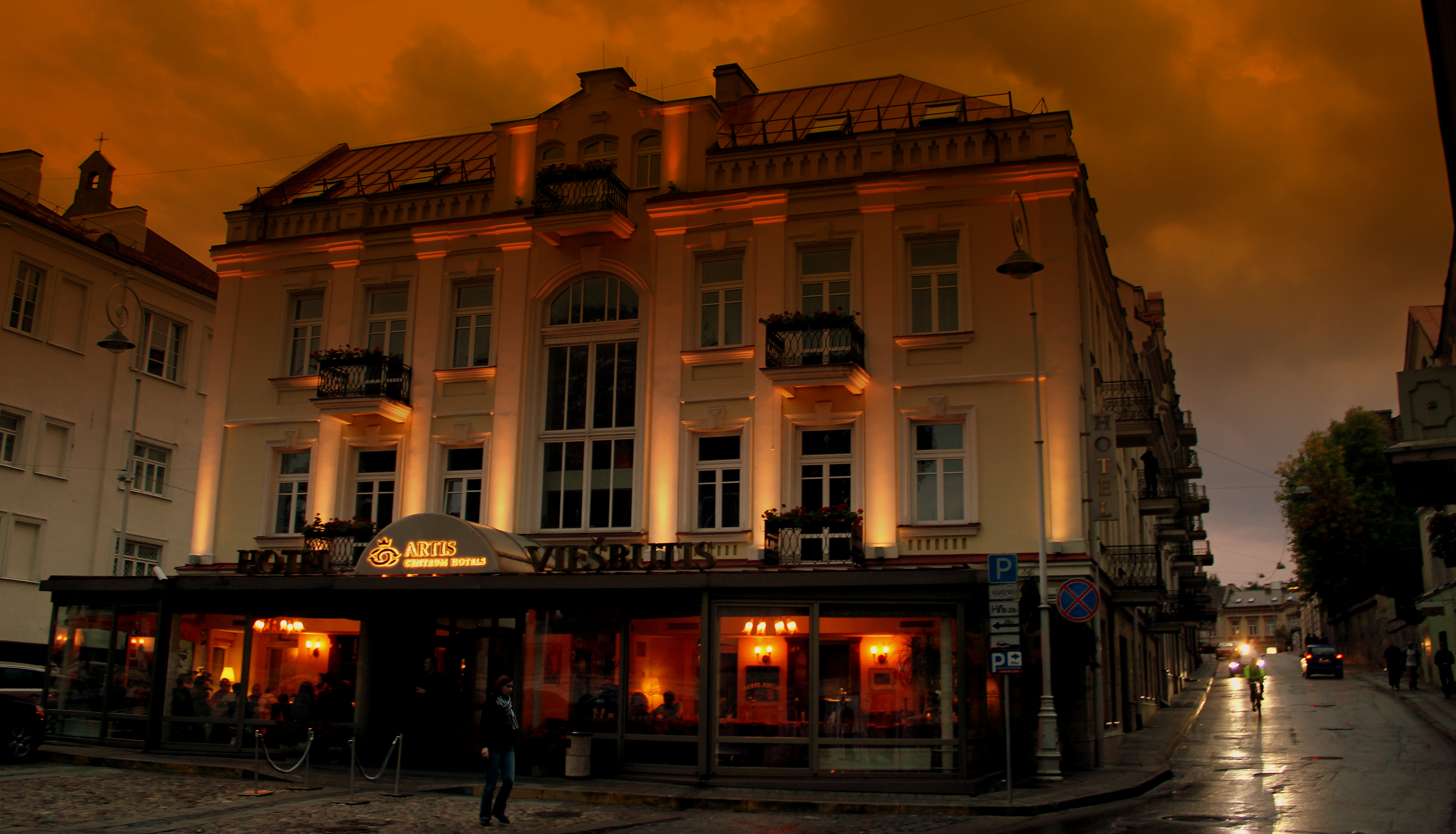 HOTEL VIESBUTIS VILLINUS OLD TOWN LITHUANIA SEP 2013